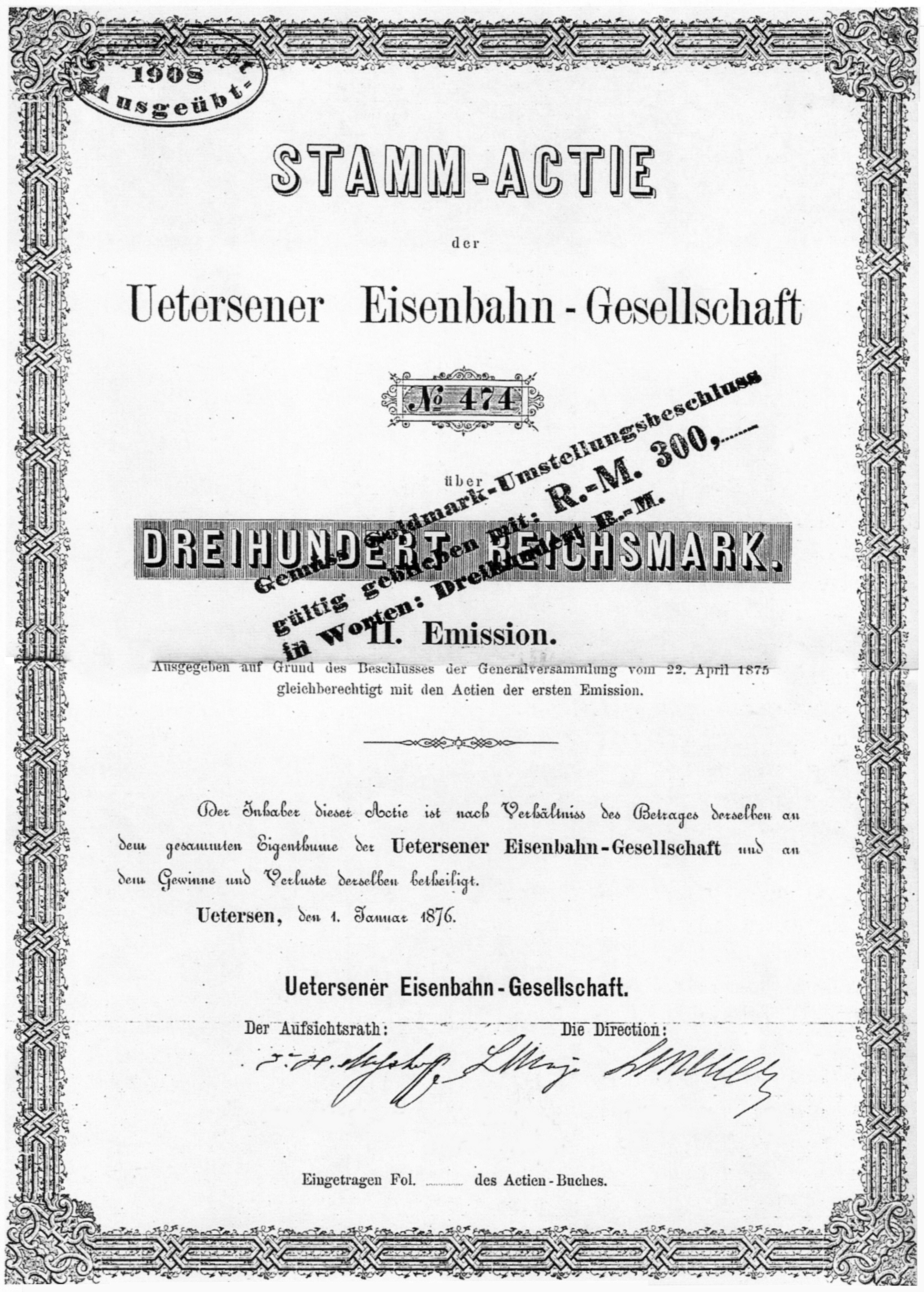 Aktie der Uetersener Eisenbahn Gesellschaft über 300 Reichsmark aus dem Jahr 1876 .